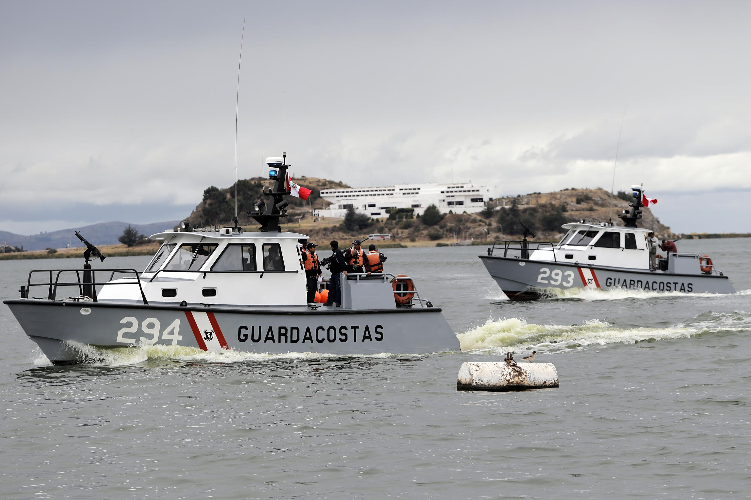 El ministro de Defensa, Pedro Cateriano Bellido, participó en la inauguración de dos modernas patrulleras lacustres construidas por los Servicios Industriales de la Marina (SIMA) para realizar operaciones de seguridad y ayuda social en el Lago Titicaca, región Puno. El titular del sector llegó al muelle de la Capitanía de Puno de la Marina de Guerra junto al Presidente del Consejo de Ministros, Juan Jiménez Mayor, del ministro del Interior, Wilfredo Pedraza, y del comandante general de la Marina, almirante Carlos Tejada Mera, entre otras autoridades.